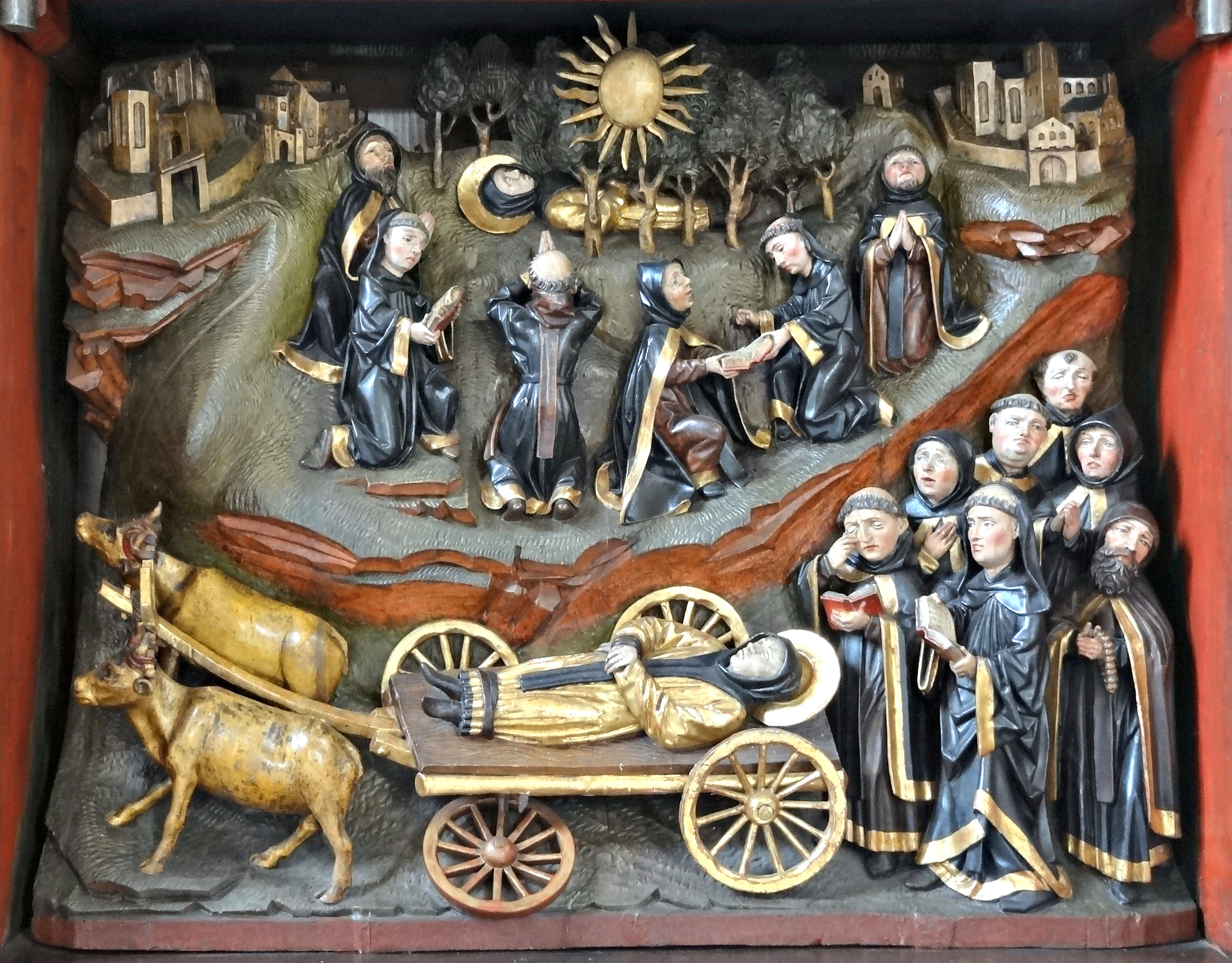 Detail:File:Ehemalige Hospitalkapelle St. Wendelin (Butzbach) Wendelinsaltar Feld 7 02.JPG